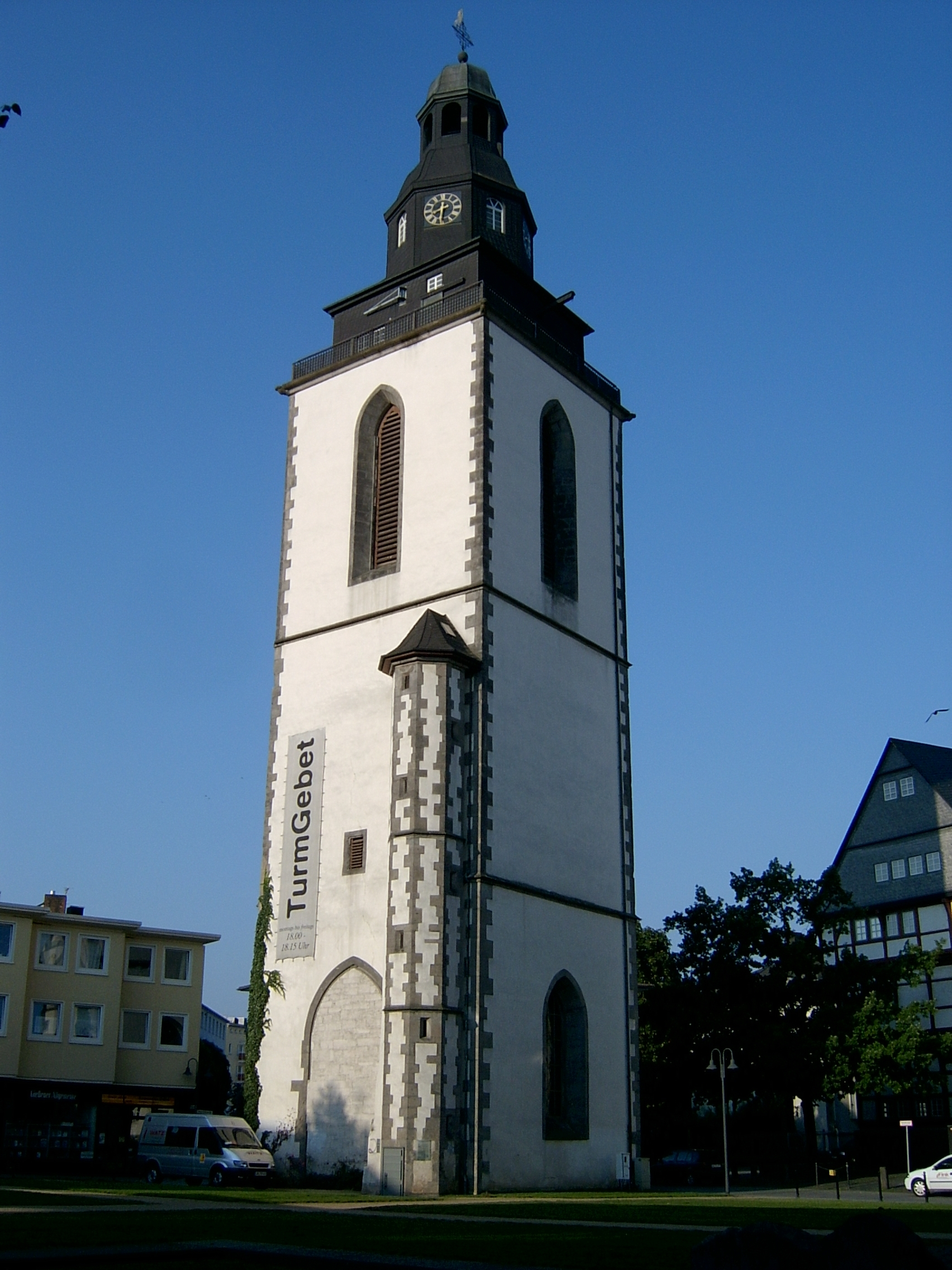 Der nach dem Zweiten Weltkrieg erhaltene dreigeschossige gotische Turm mit Helmaufbau der Stadtkirche in Gießen, Kirchenplatz 1.